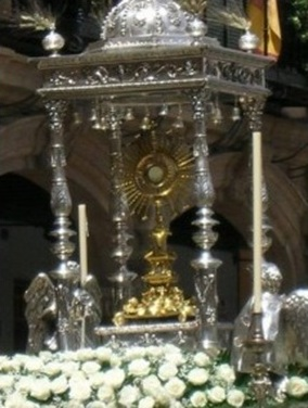 Custodia Corpus Christi Catedral de Guadix